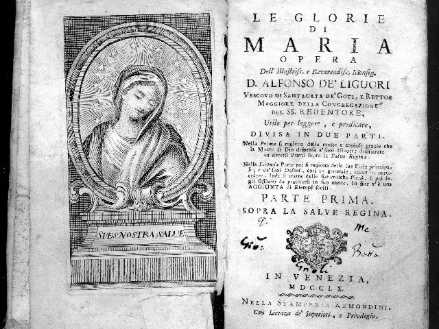 Alfonso Maria de' Liguori, Stamperia Remondini con licenza de' Superiori e Privilegio, 1750